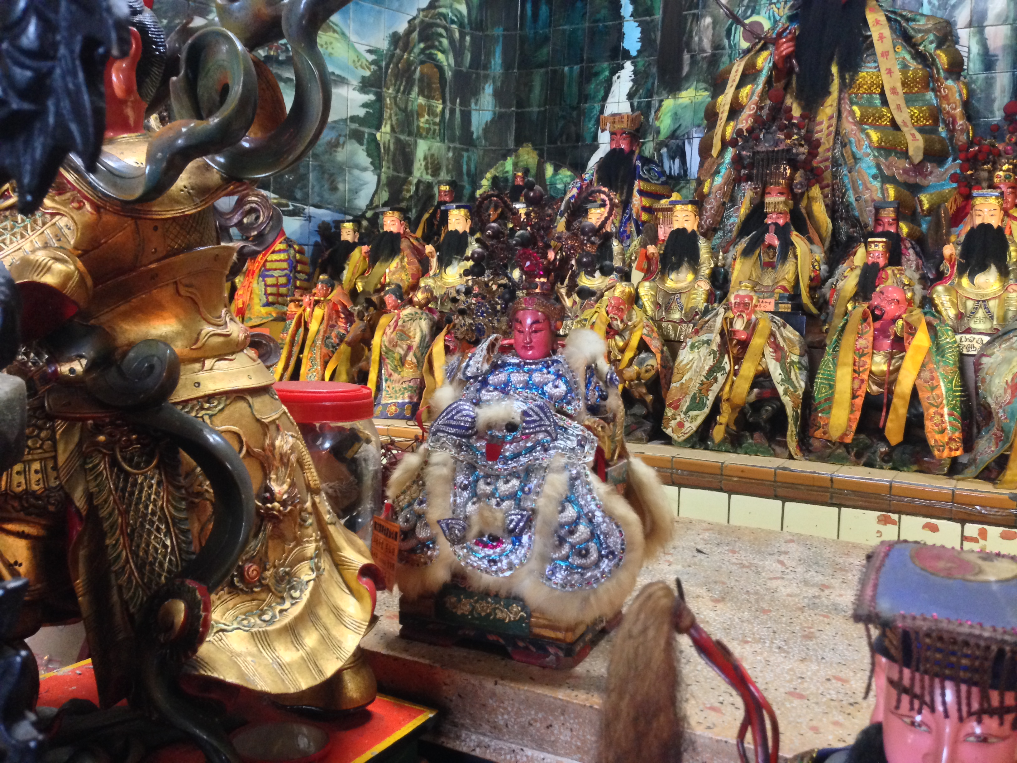 中文（台灣）: 南方澳南仙宮代表陳來福的神像。